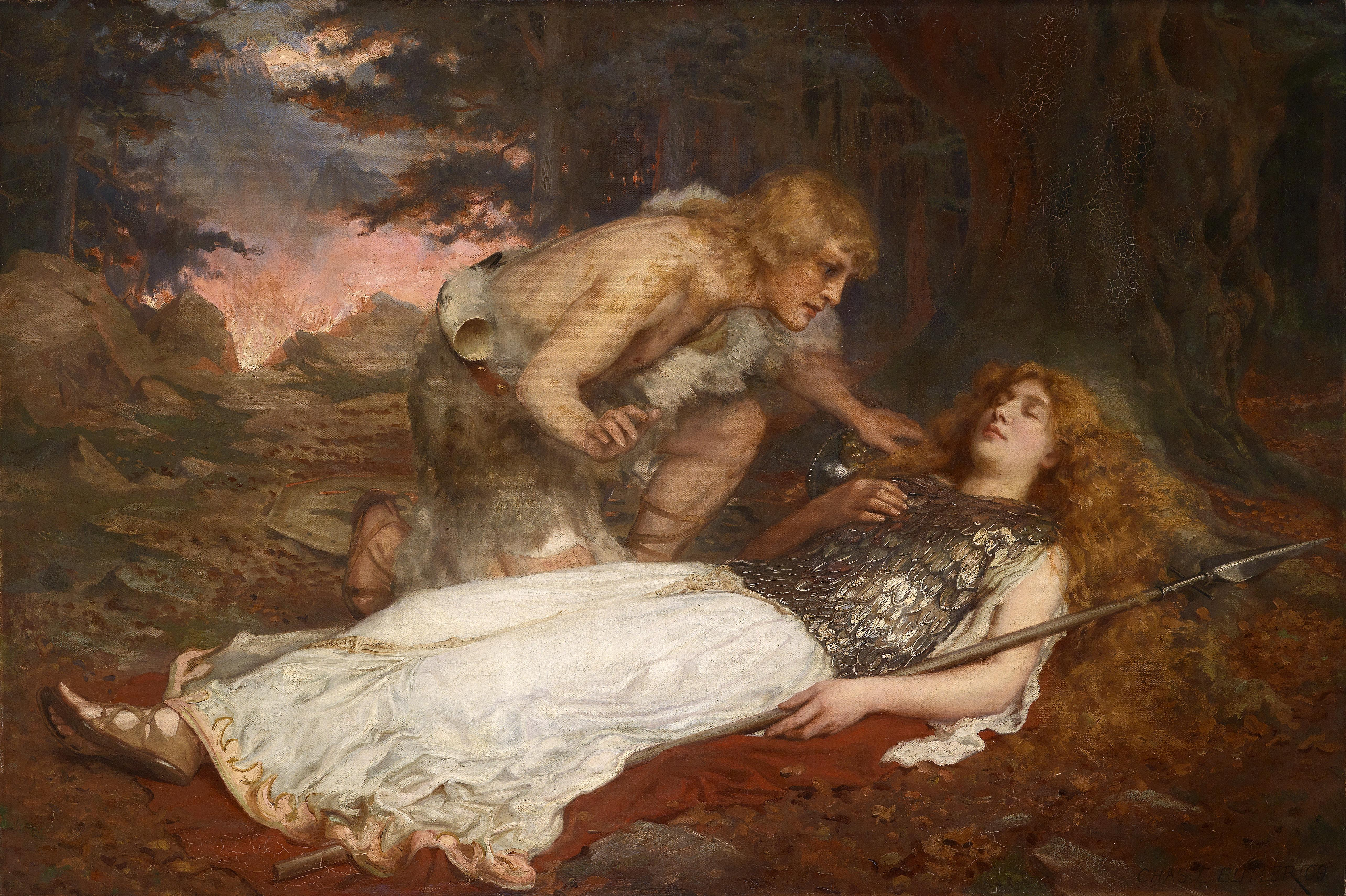 Siegfried und Brunnhilde